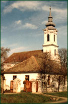 Kőröshegy, református templom. A képet én készítettem (fényképeztem) Bp